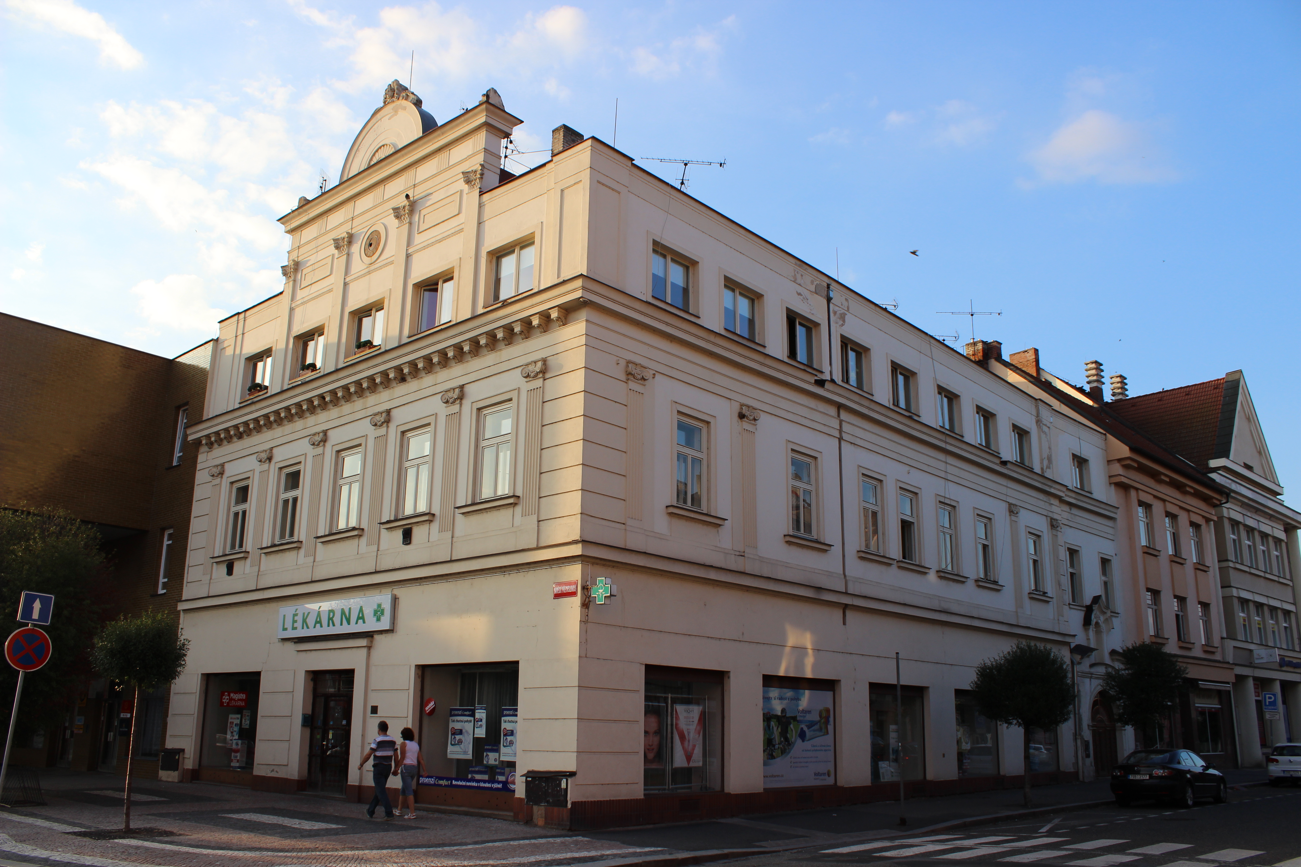 Nárožní dům na náměstí Přemyslovců (vlevo) a Palackého třídě (vpravo) v Nymburce.